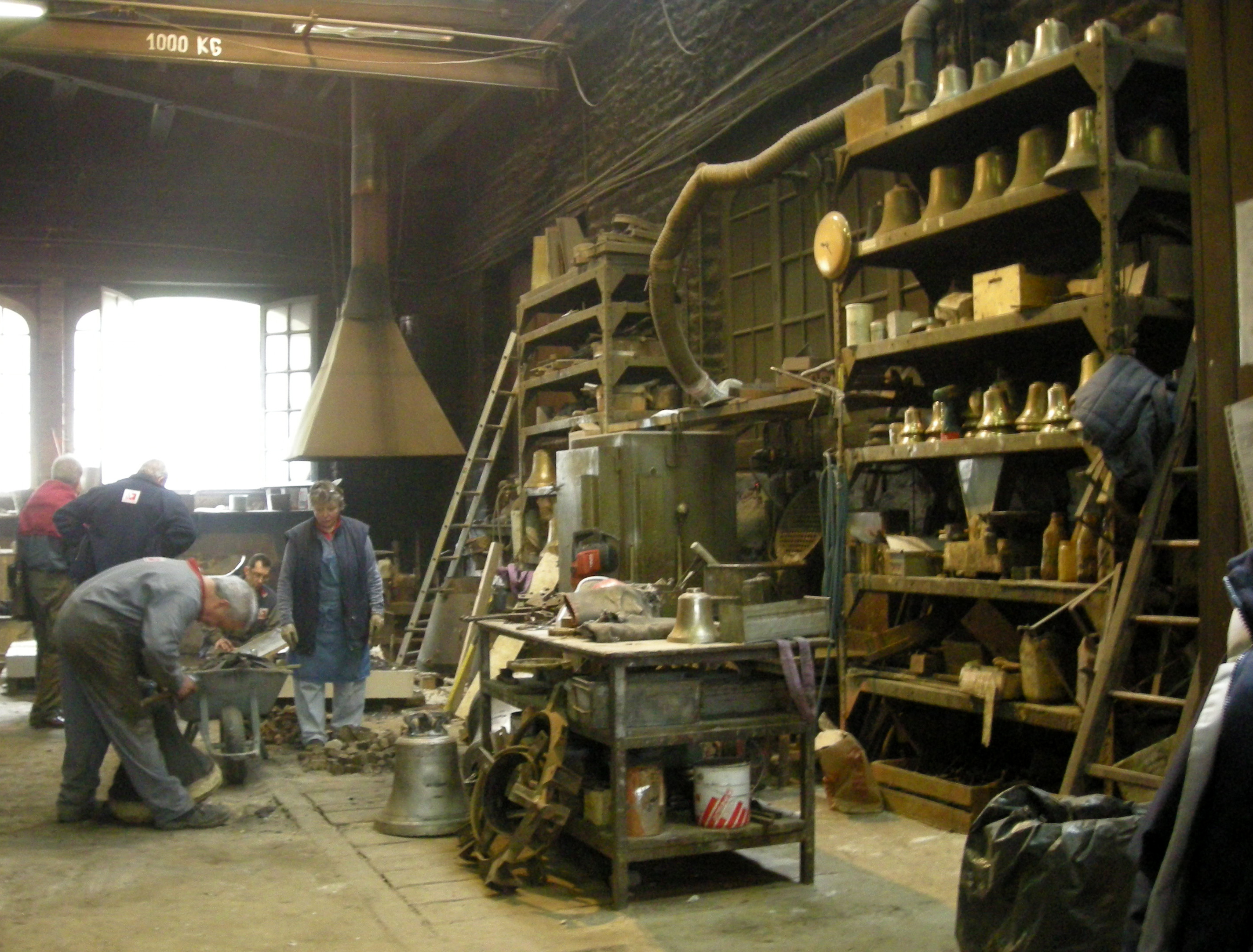 Atelier à la Fonderie Cornille-Havard à Villedieu-les-Poêles (Manche, Normandie). Démoulage manuel des cloches.